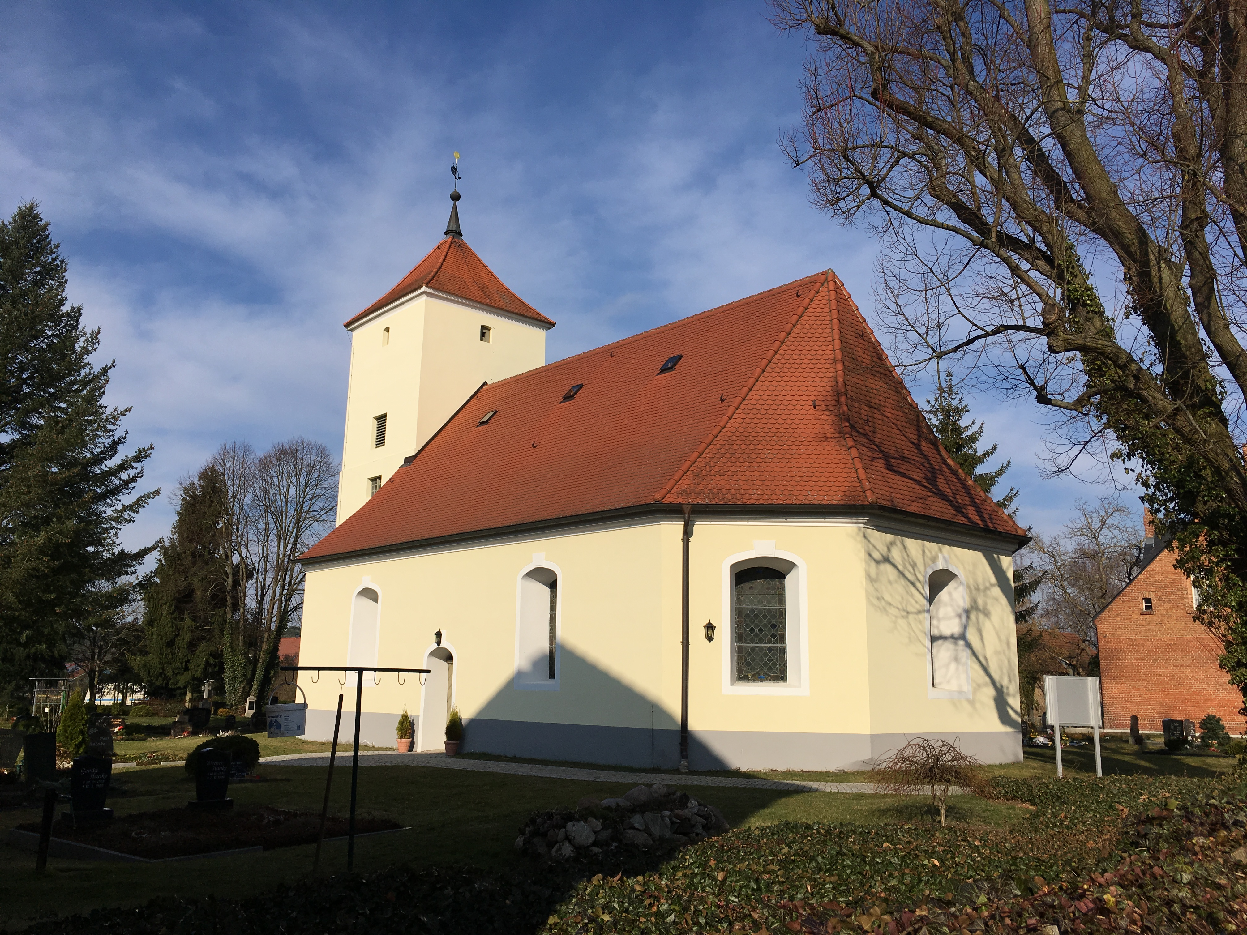 Das genaue Baudatum der Dorfkirche Glienick ist nicht genau bekannt. Experten gehen davon aus, dass es sich um einen spätmittelalterlichen Bau handelt, dessen Ostwand 1730 erneuert wurde. Im Innern befinden sich ein mit Schnitzwangen verzierter Kanzelaltar aus dem 18. Jahrhundert mit einem Gesprengten Giebel und eine hölzerne Fünte aus dem Jahr 1570.